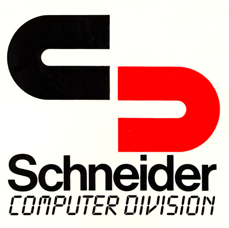 Werbeaufkleber der Schneider Computer Division aus den 1990ern